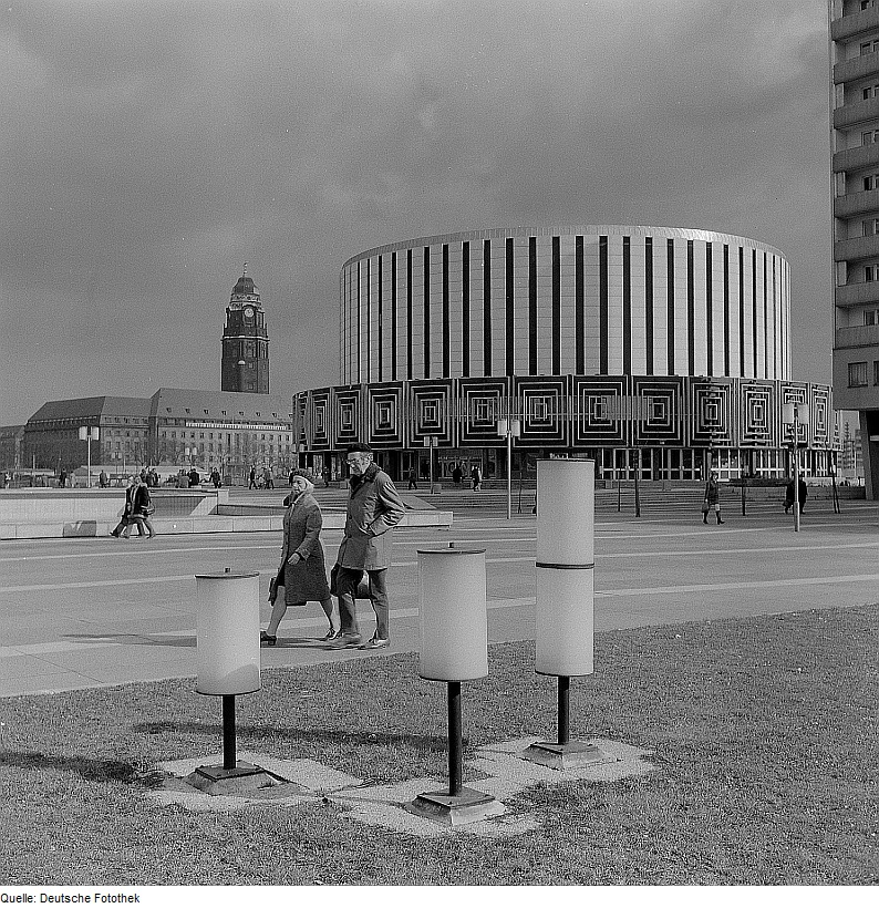 Original image description from the Deutsche Fotothek Dresden. Blick auf das Rundkino, im Hintergrund das Rathaus